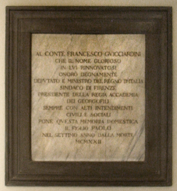 Lapide al conte Francesco Guicciardini in Palazzo Guicciardini a Firenze.